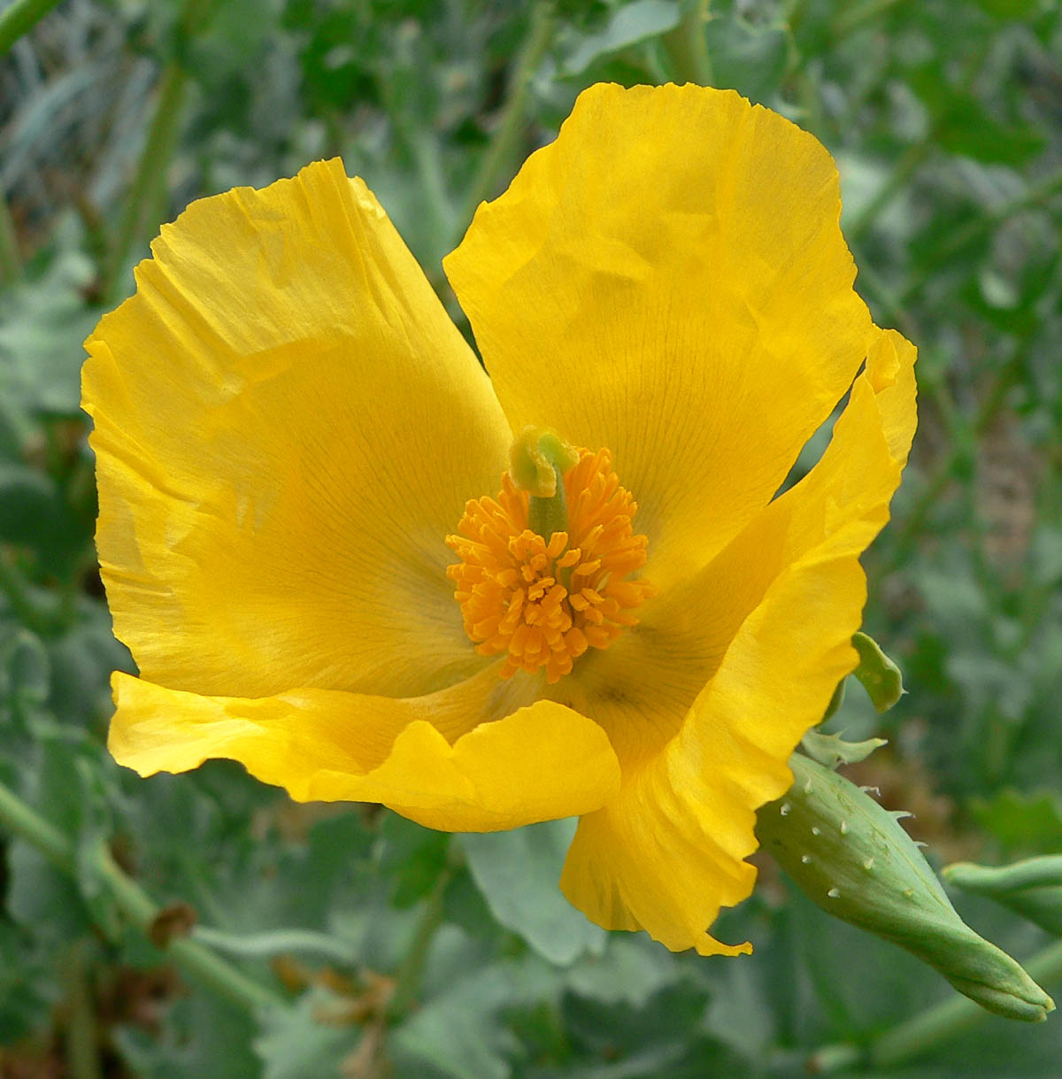 Photo of Glaucium flavum var. flavum